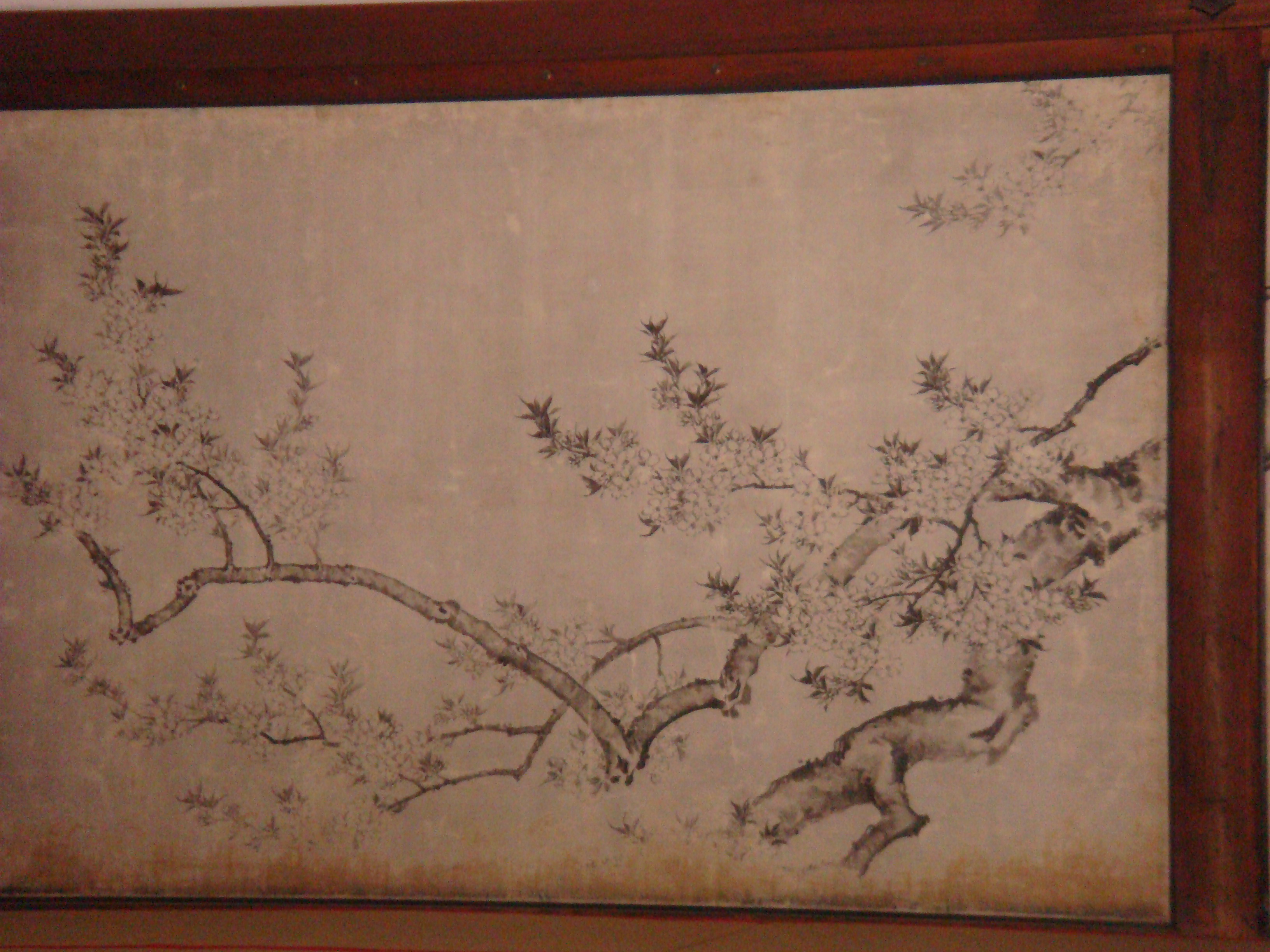 Kyoto